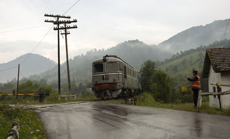 Bistra, Maramureş, Rumänien – Der Regionalzug (BÜ) mit Lok 62-0732-8 auf der Bahnstrecke Salva–Sighetu Marmaţiei verlässt Bistra Richtung Salva